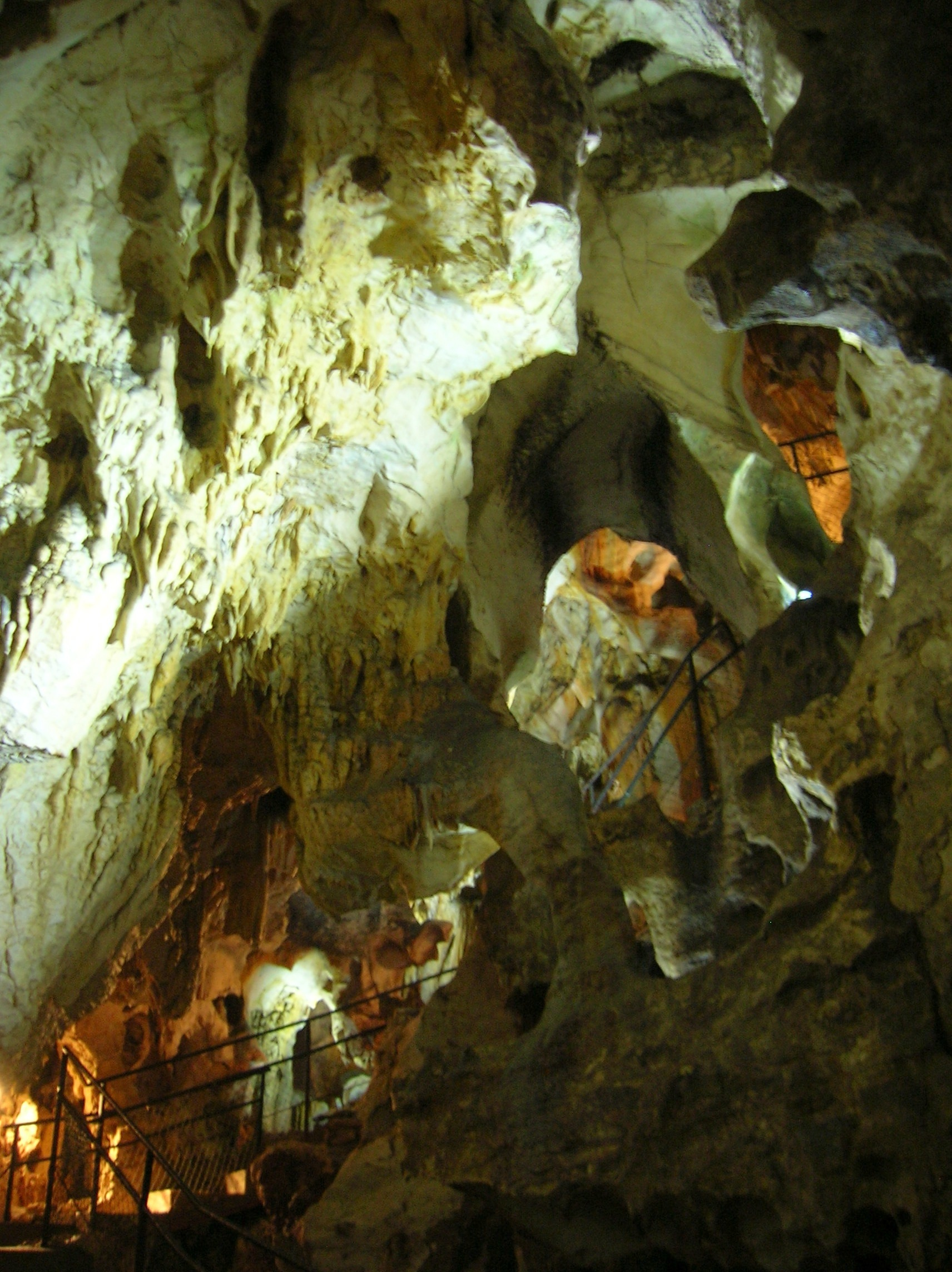 grotte de Thaïs, Saint-Nazaire-en-Royans, France.